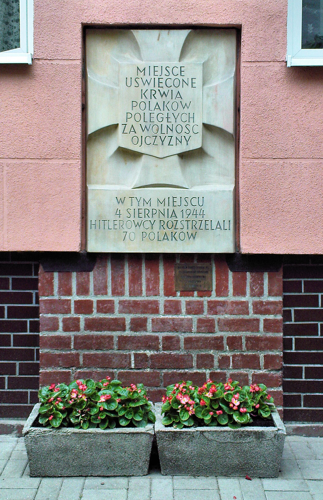 Miejsce pamięci rozstrzelania przez hitlerowców w dniu 4 sierpnia 1944 r 70 Polaków - ul. Olesińska 5